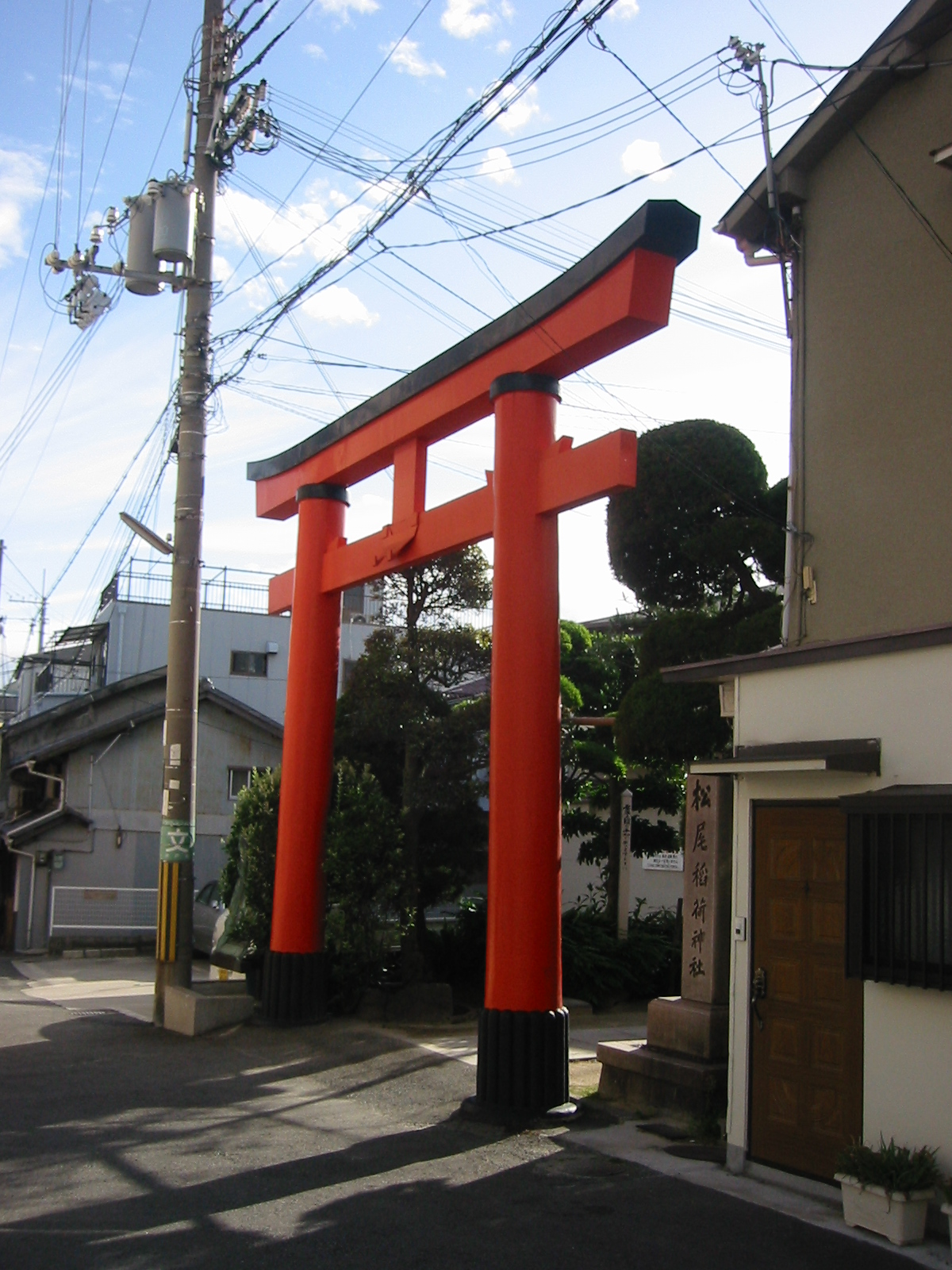 神戸松尾稲荷神社